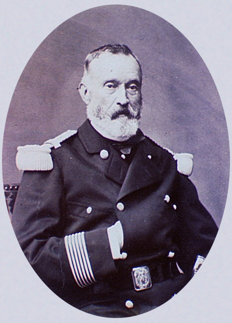 Jacques Léon Clément-Thomas, né en 1809 à Libourne (Gironde) et fusillé le 18 mars 1871 à Paris, est un des premiers morts de la Commune de Paris.